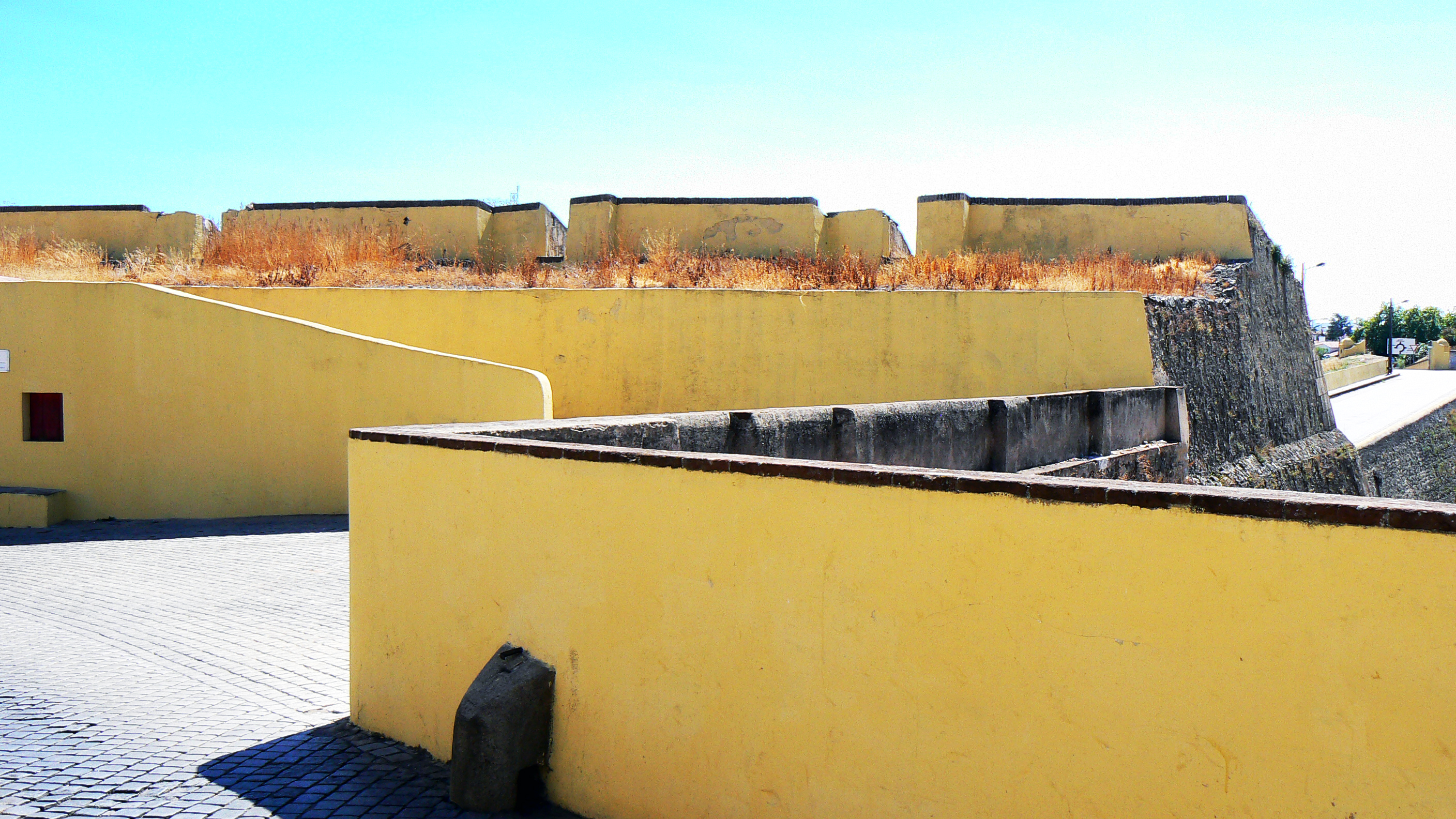 Baluarte em Elvas, Portugal